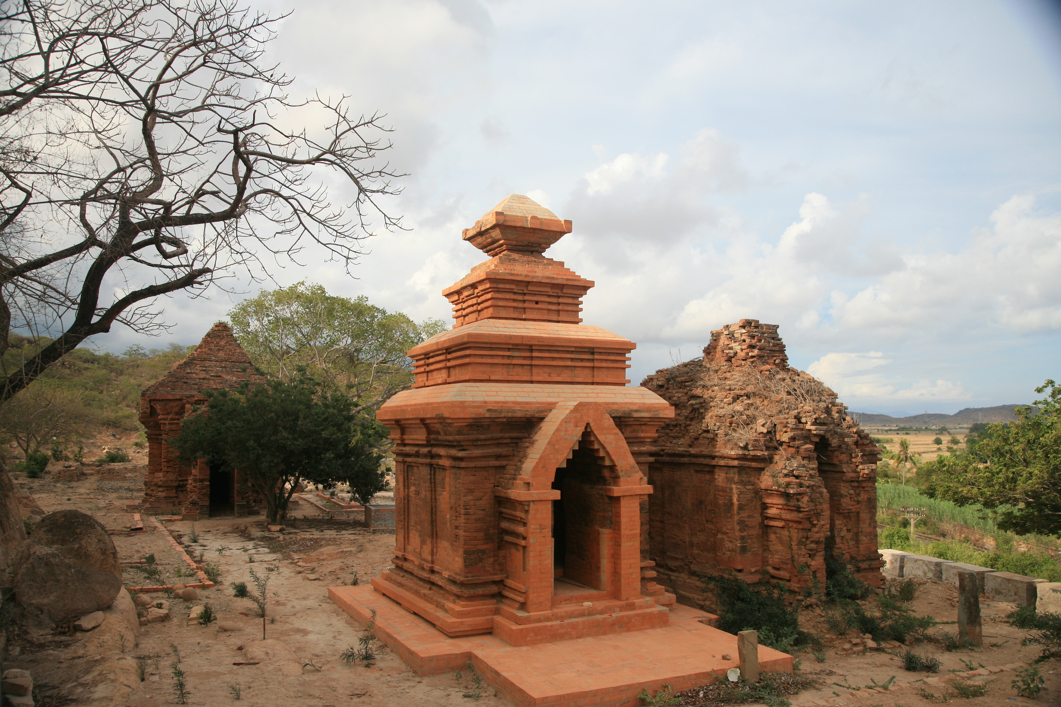 Toàn cảnh quần thể di tích tháp Po Dam, Bình Thuận.